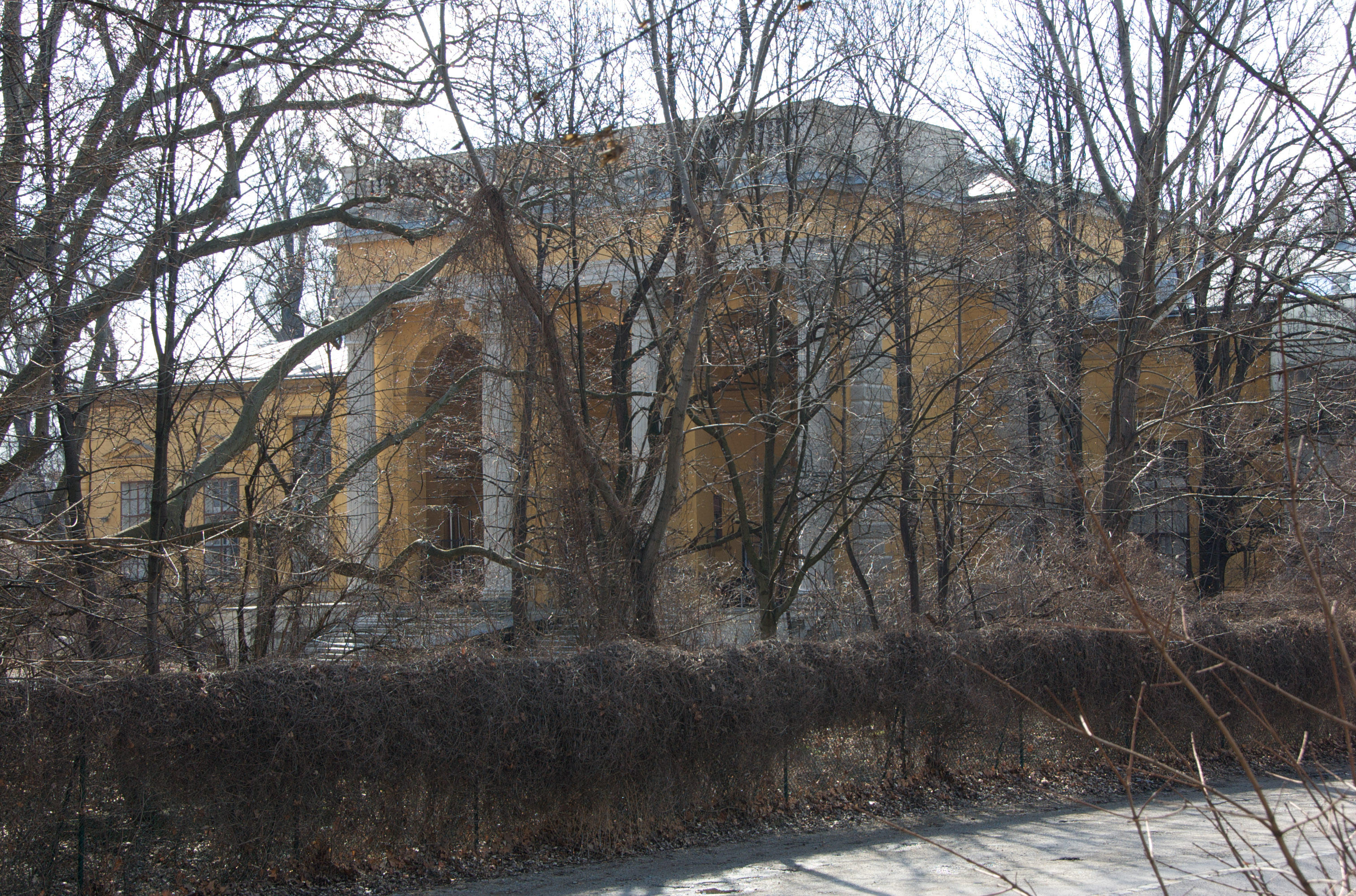 Südlicher Pavillon für Kunst, 2009